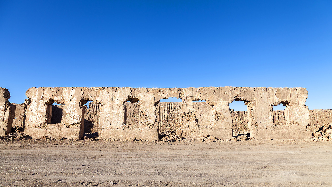 Ruinas del pueblo de Pampa Unión This is a photo of a national monument in Chile: 543